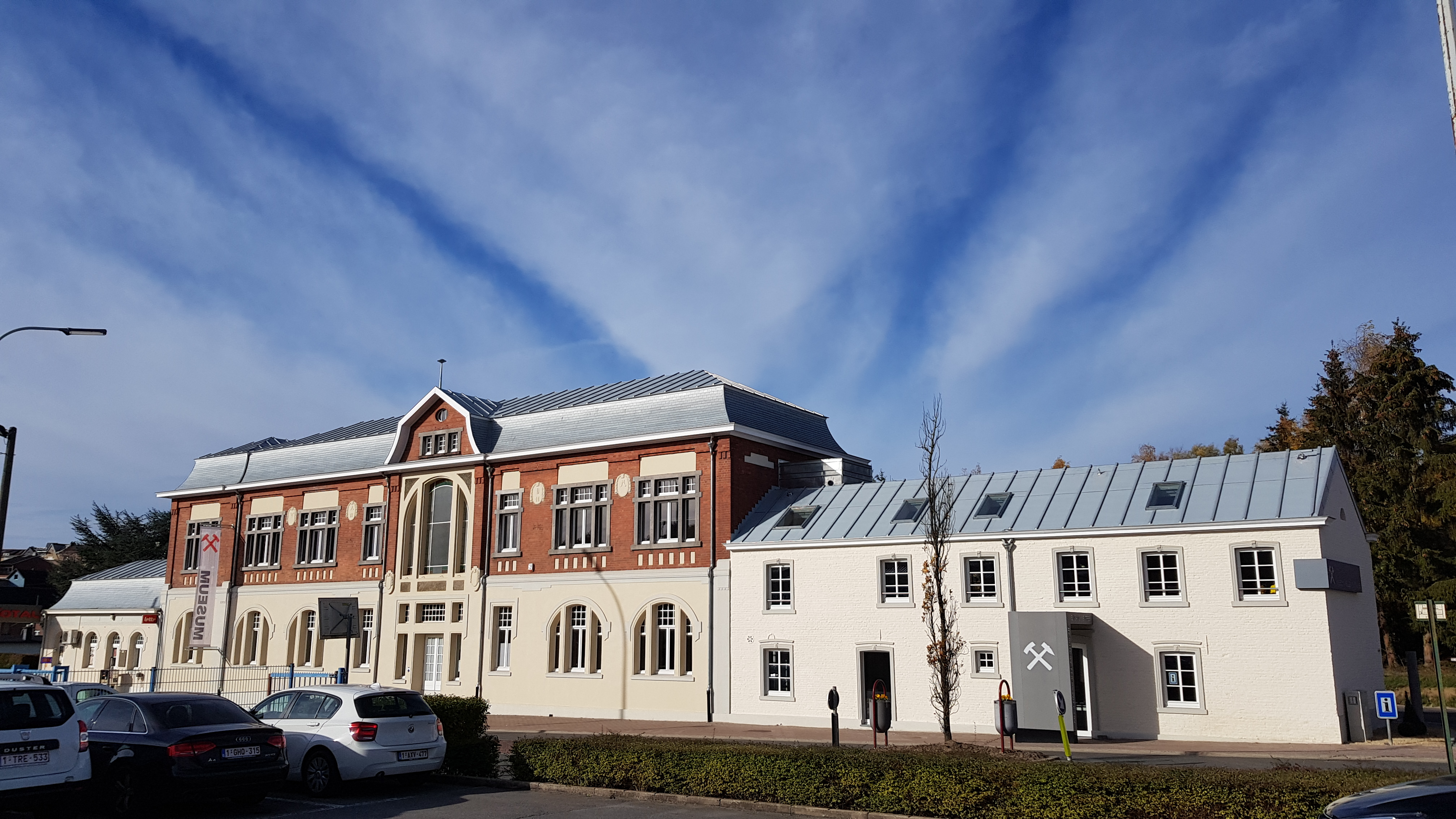 Direktionsgebäudes der Société anonyme des Mines et Fonderies de Zinc de la Vieille Montagne, Kelmis, Belgien This photo of immovable heritage has been taken in the Walloon Region